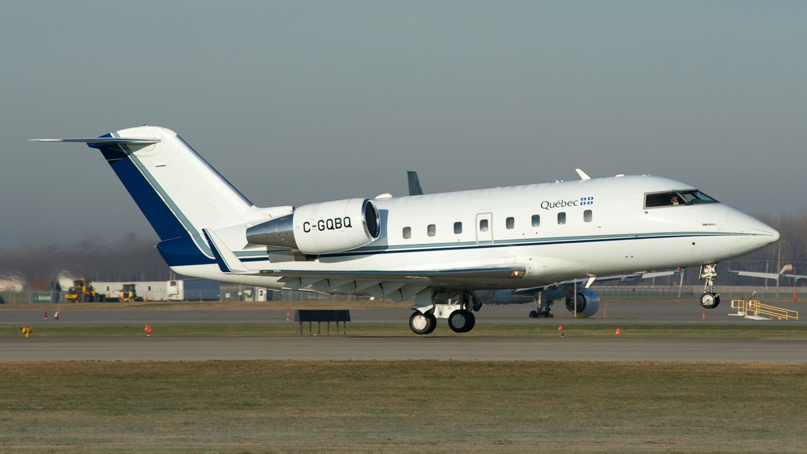 Departing Montréal-Trudeau